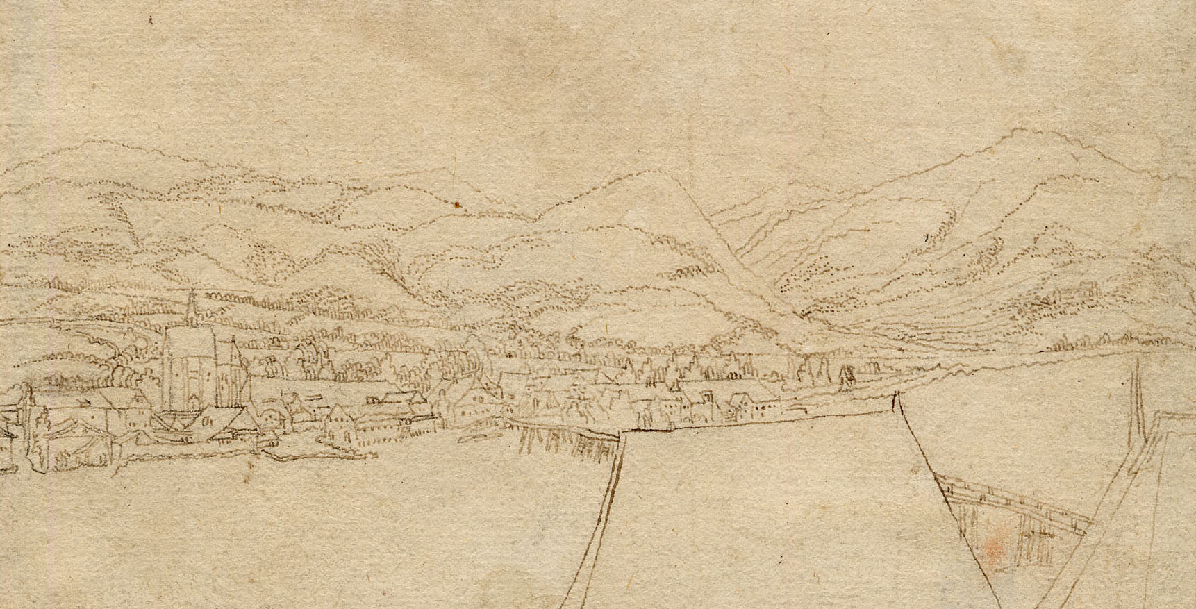 Älteste Ansicht von Urfahr